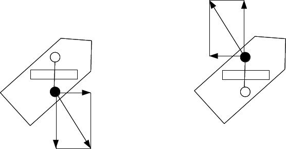 Žirokompasa zvalstīšanās kļūda